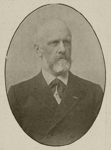 Jhr. mr. P.J. van Swinderen (1842-1911) bij zijn benoeming tot vicepresident van de Raad van State